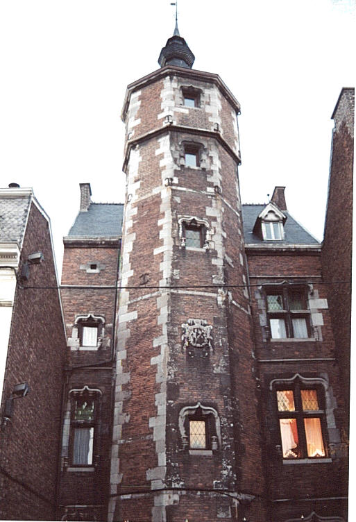 La tour de l’Hôtel des comtes d'Oultremont à Huy, 1559.